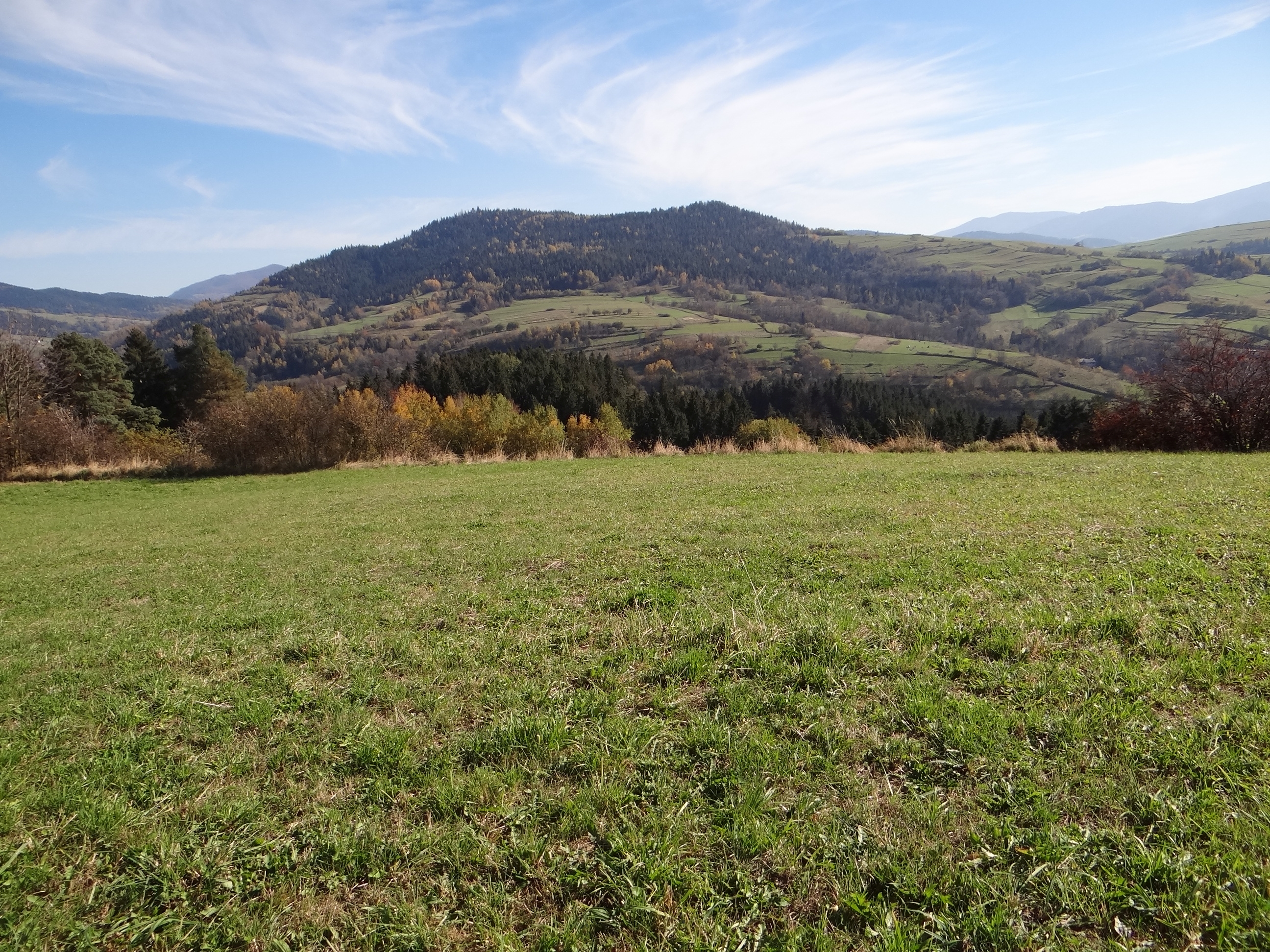 Ostra i Szczebel, widok z grzbietu Czarnego Działu